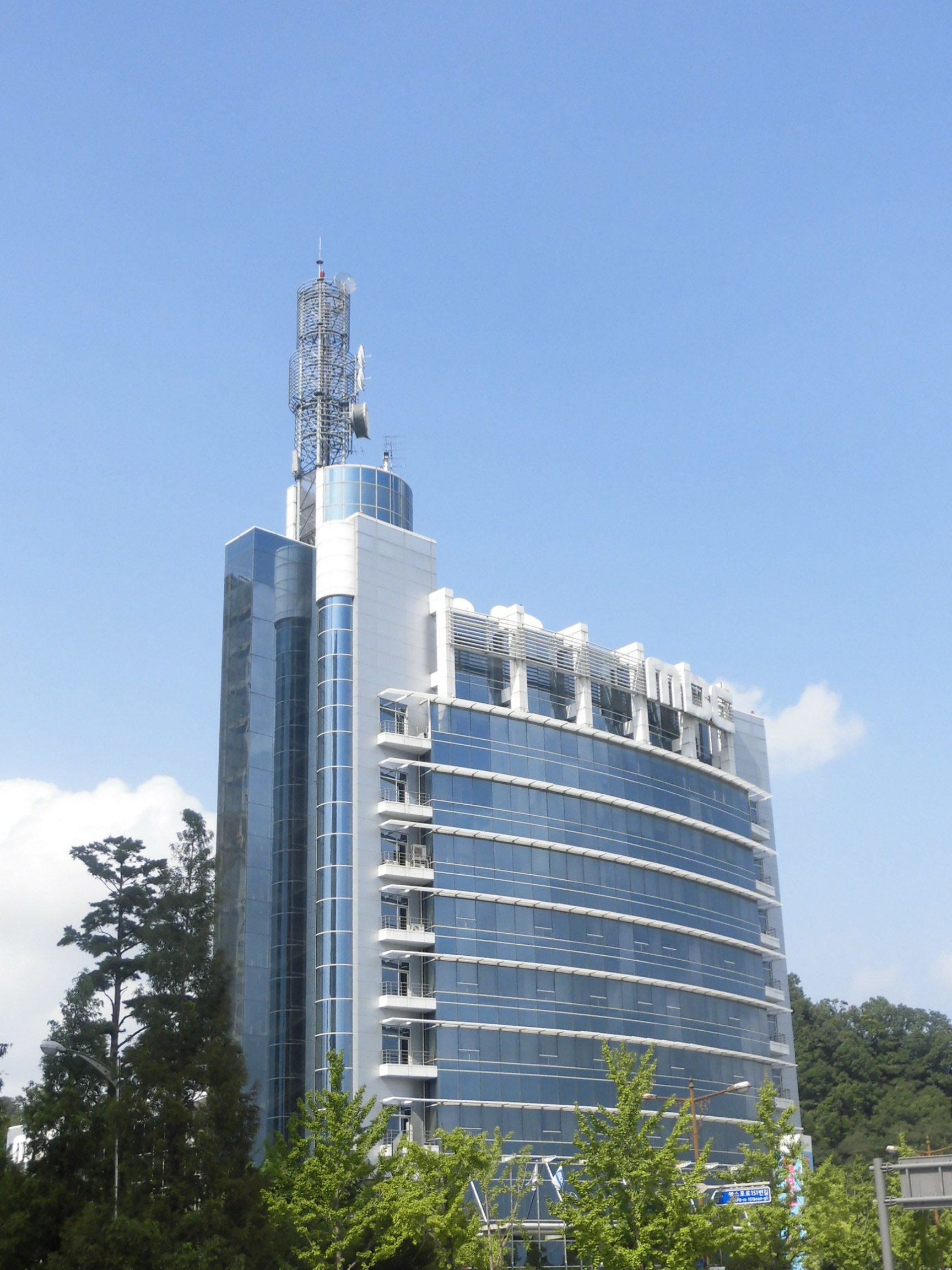 대전광역시에 있는 대전문화방송